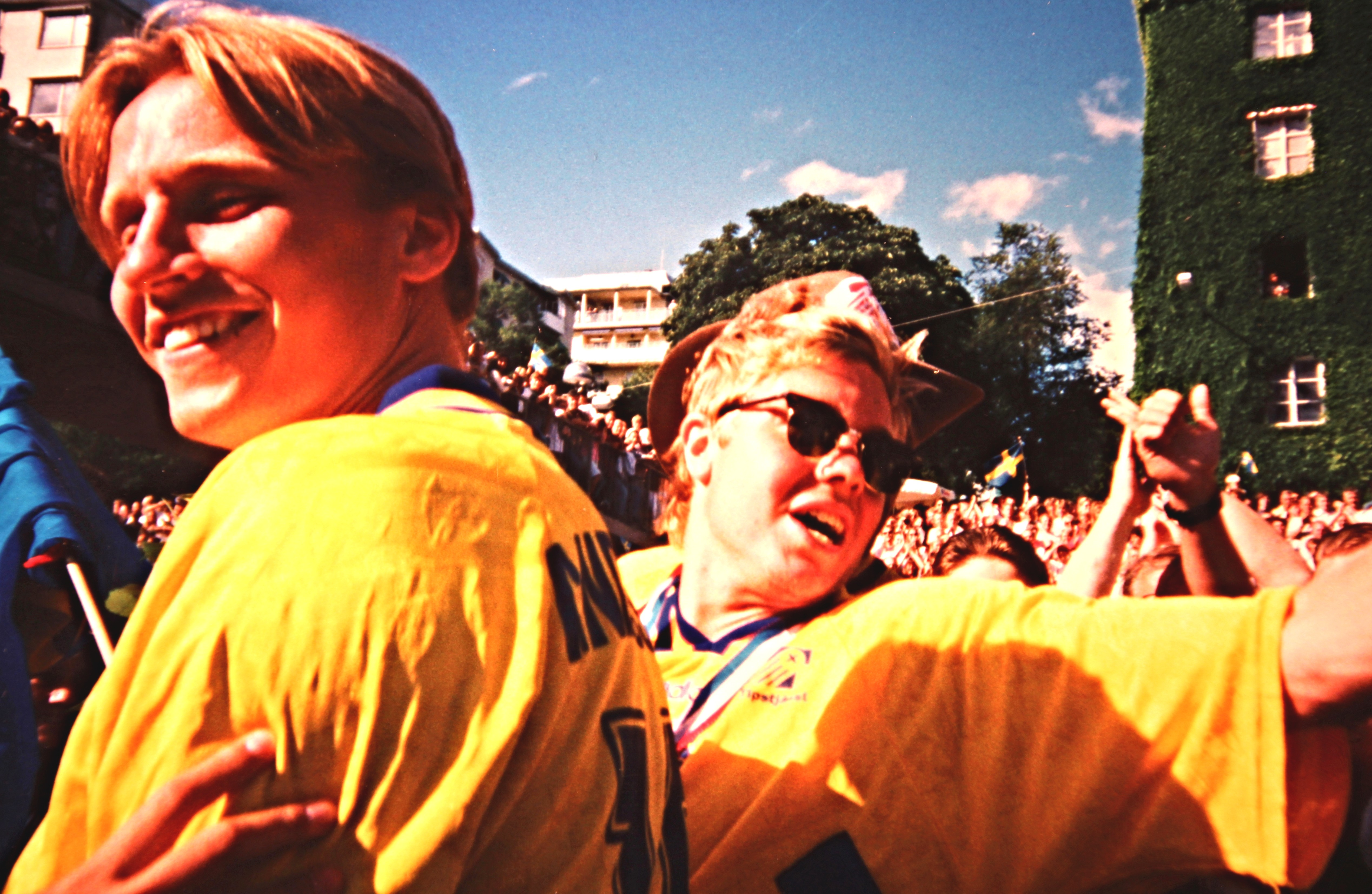 Svenska herrlandslaget i fotboll, hemkomst efter FIFA VM 1994, firande den 18 juli 1994 i Stockholm, Norr Mälarstrand